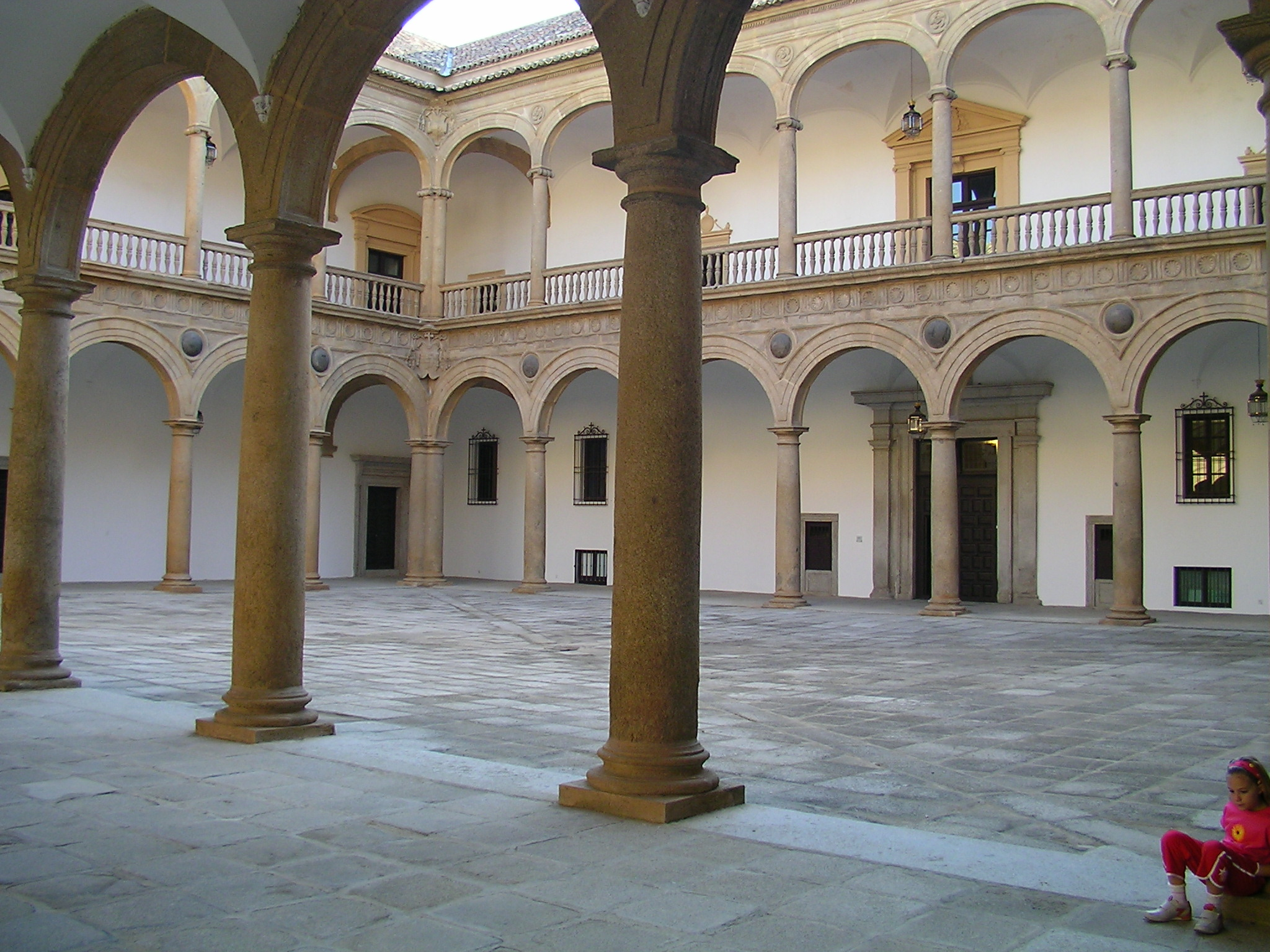 Palacio Tavera in Toledo, Innenhof